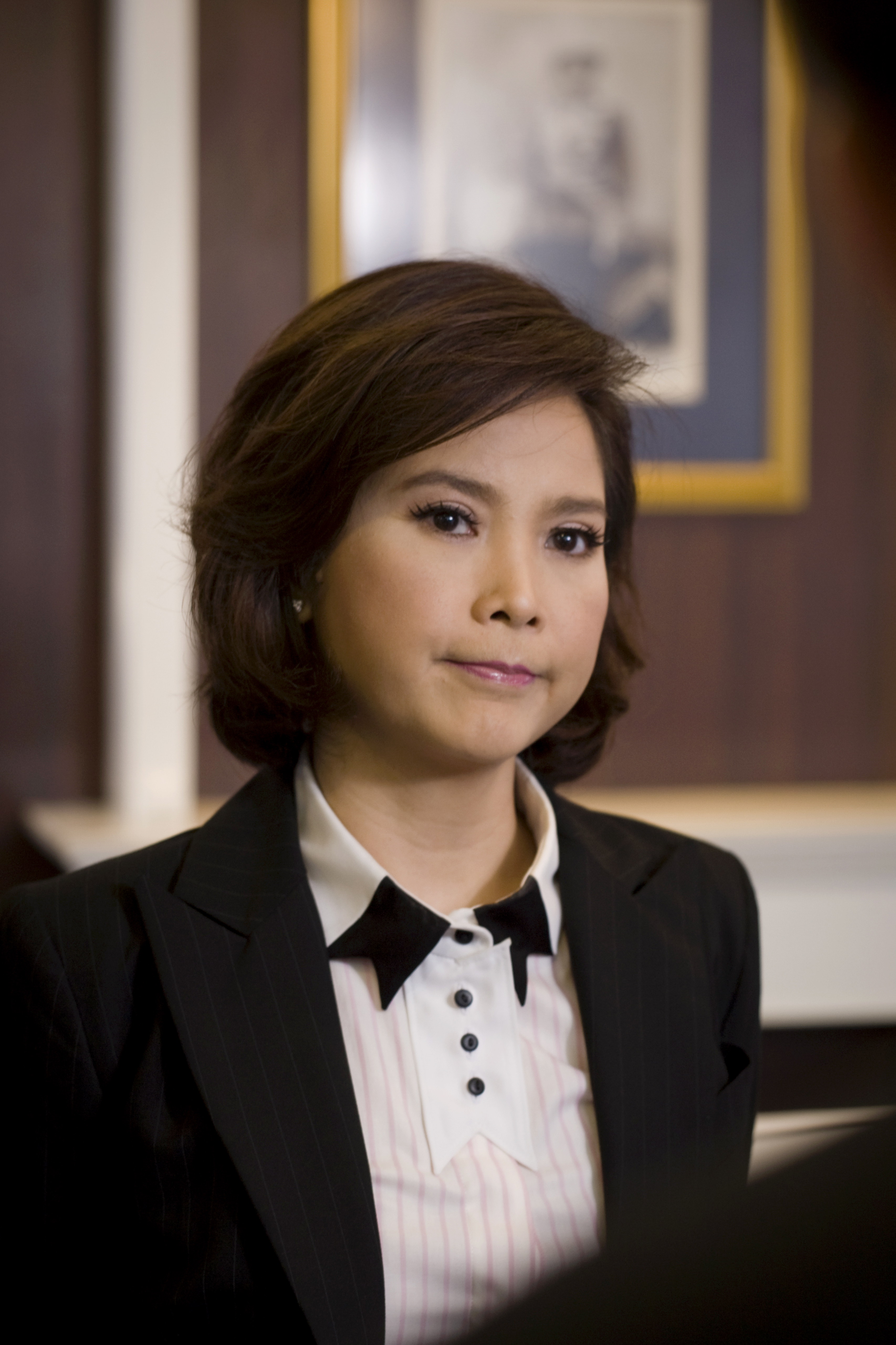 นารากร ติยายน / นายกรัฐมนตรีออกอากาศสดรายการเชื่อมั่นประเทศไทยกับนายกฯ อภิสิทธิ์ ณ กรมทหารราบที่ 11 รักษาพระองค์ 21 มีนาคม 2553 (The Official Site of The Prime Minister of Thailand Photo by พีรพัฒน์ วิมลรังครัตน์)